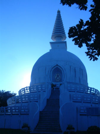 Stupa in Zalaszanto, Hungary